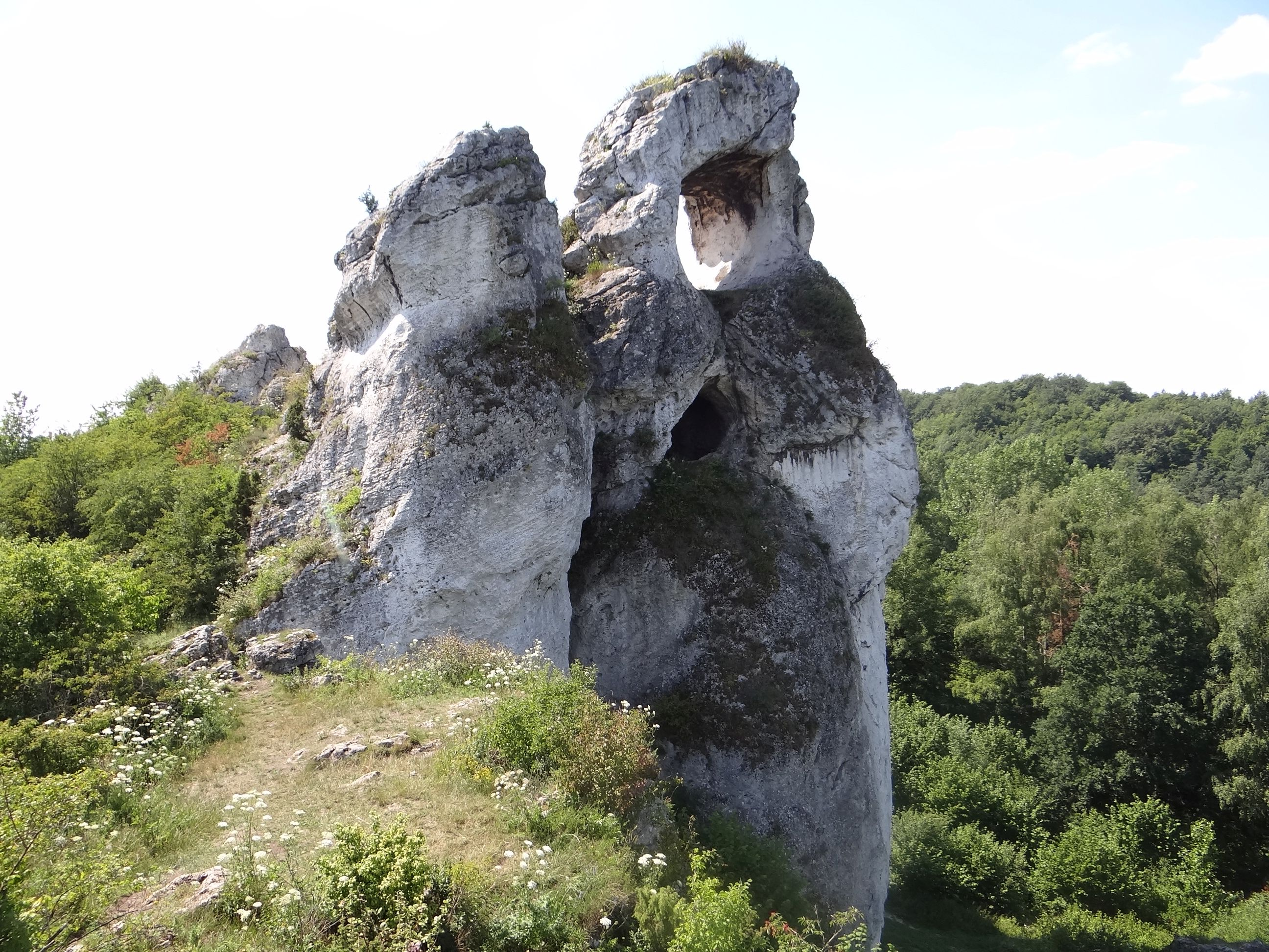 Skała Okiennik Wielki w Piasecznie